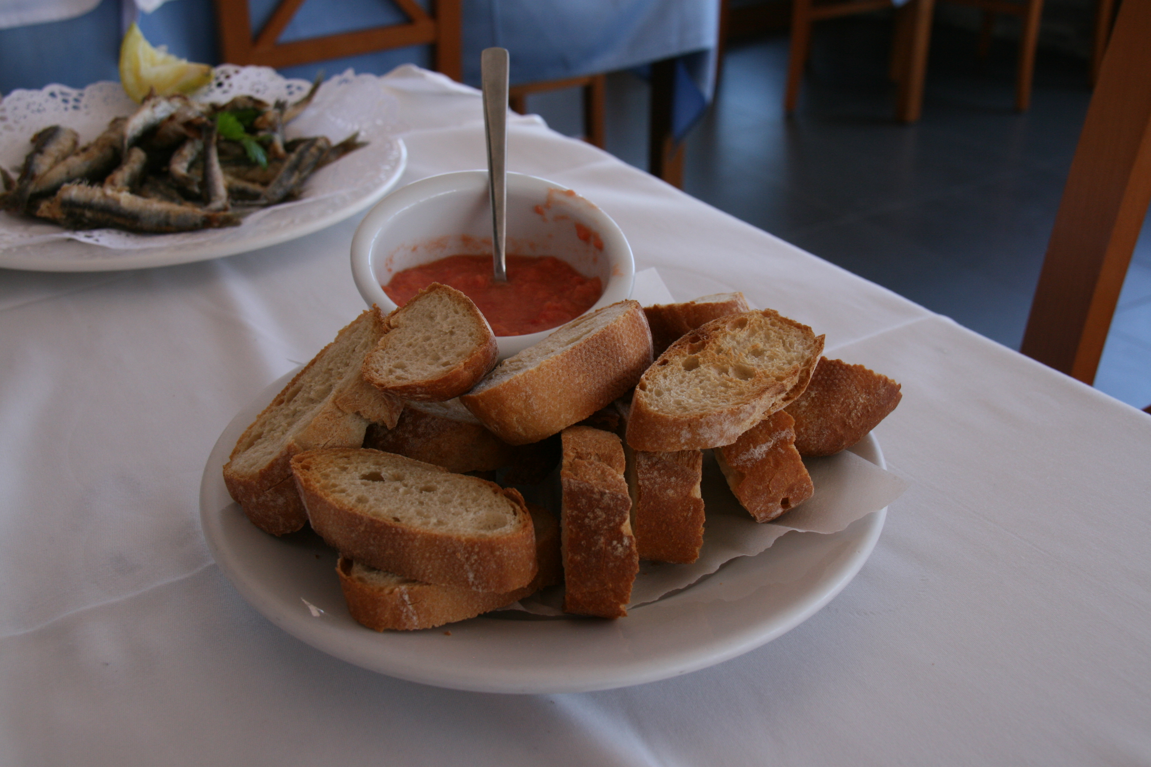 Panes y tomate - aperitivo